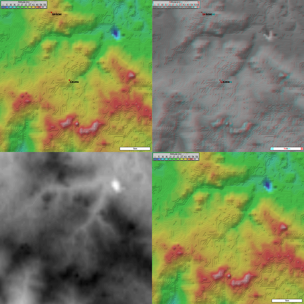 4 images topographique (5 km de coté) de cozes prisent par la mission SRTM. Image topographique + position des villes image topographique en relief + position des villes image topographique en niveau de gris (utile pour displacement map dans les logiciel 3D) Image topographique sans les villes Générée par le logiciel Radiomobile à partir des données domaine public de la mission SRTM de la NASA.